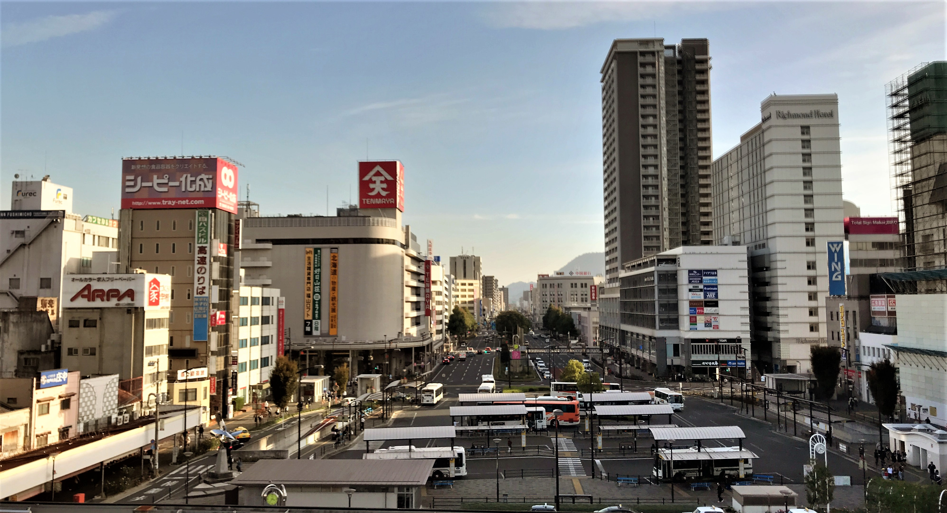 福山駅南口、駅前通り。新幹線ホームから撮影。2019年11月。右より伏見町、天満屋福山店、駅前大通り、アイネス福山、キャスパ（解体中）